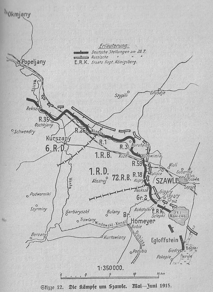 Die Schlacht von Schaulen, Schlachtverlauf 1915